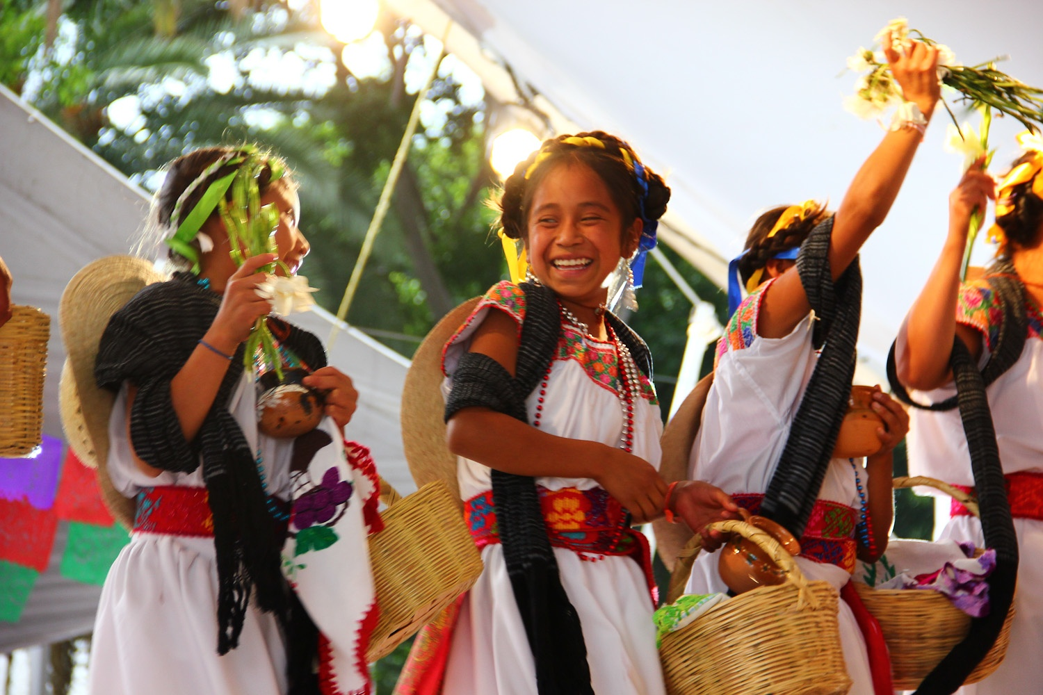 Niñas pertenecientes a la etnia Nahua del estado de Puebla, México ejecutan una danza tradicional, Puebla, Puebla, México.